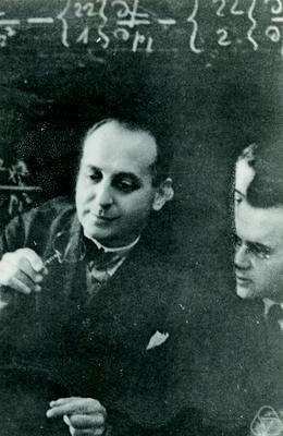 Foto di Georg Feigl